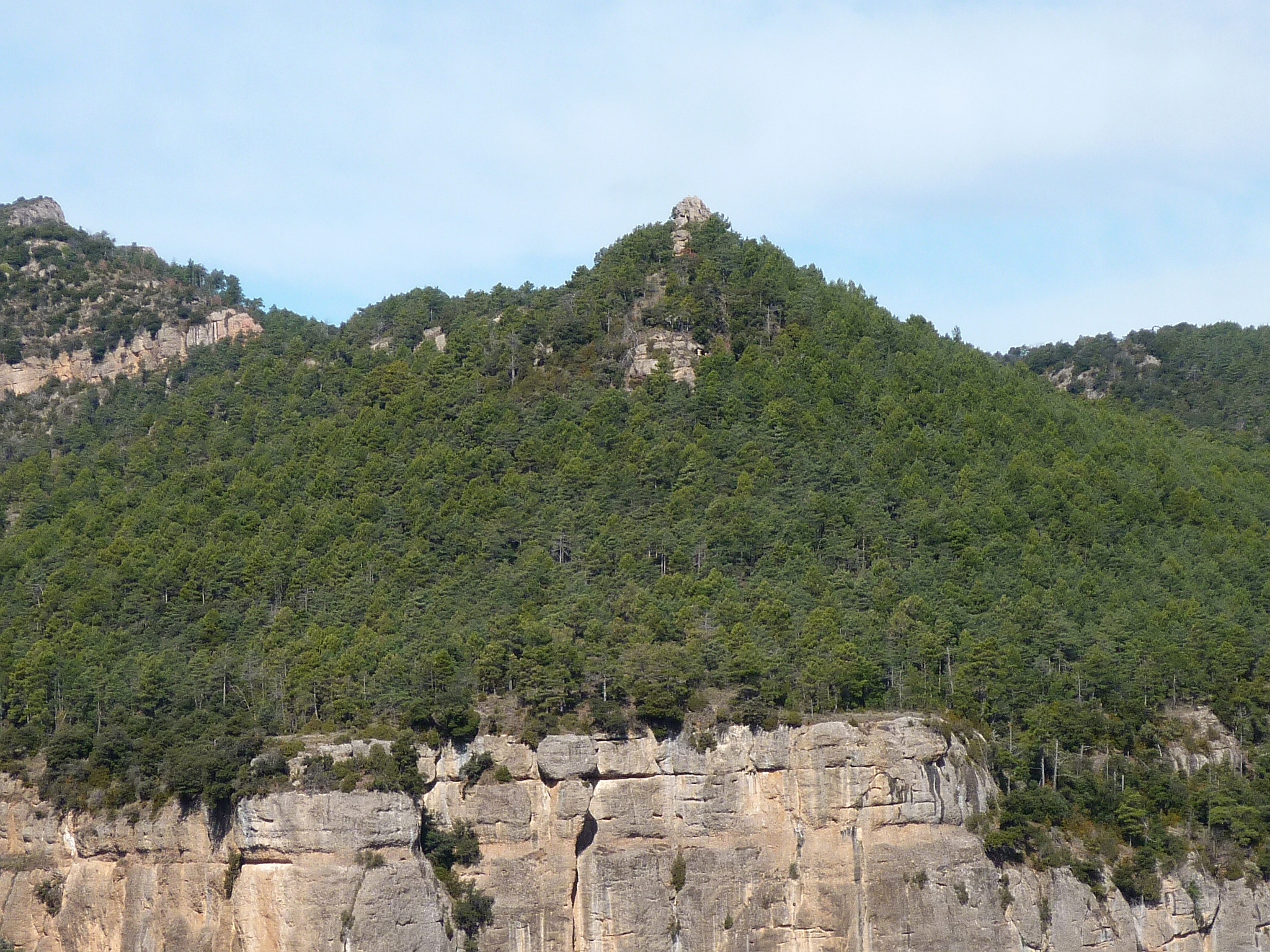 El Castellot d'Orriols, sobre el Cingle d'Estaques, a la Serra de Busa, vist des de les Canals. Navès (Solsonès -Catalunya)